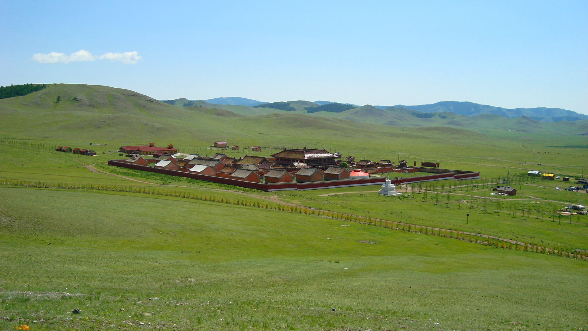 Amarbayasgalant monastery